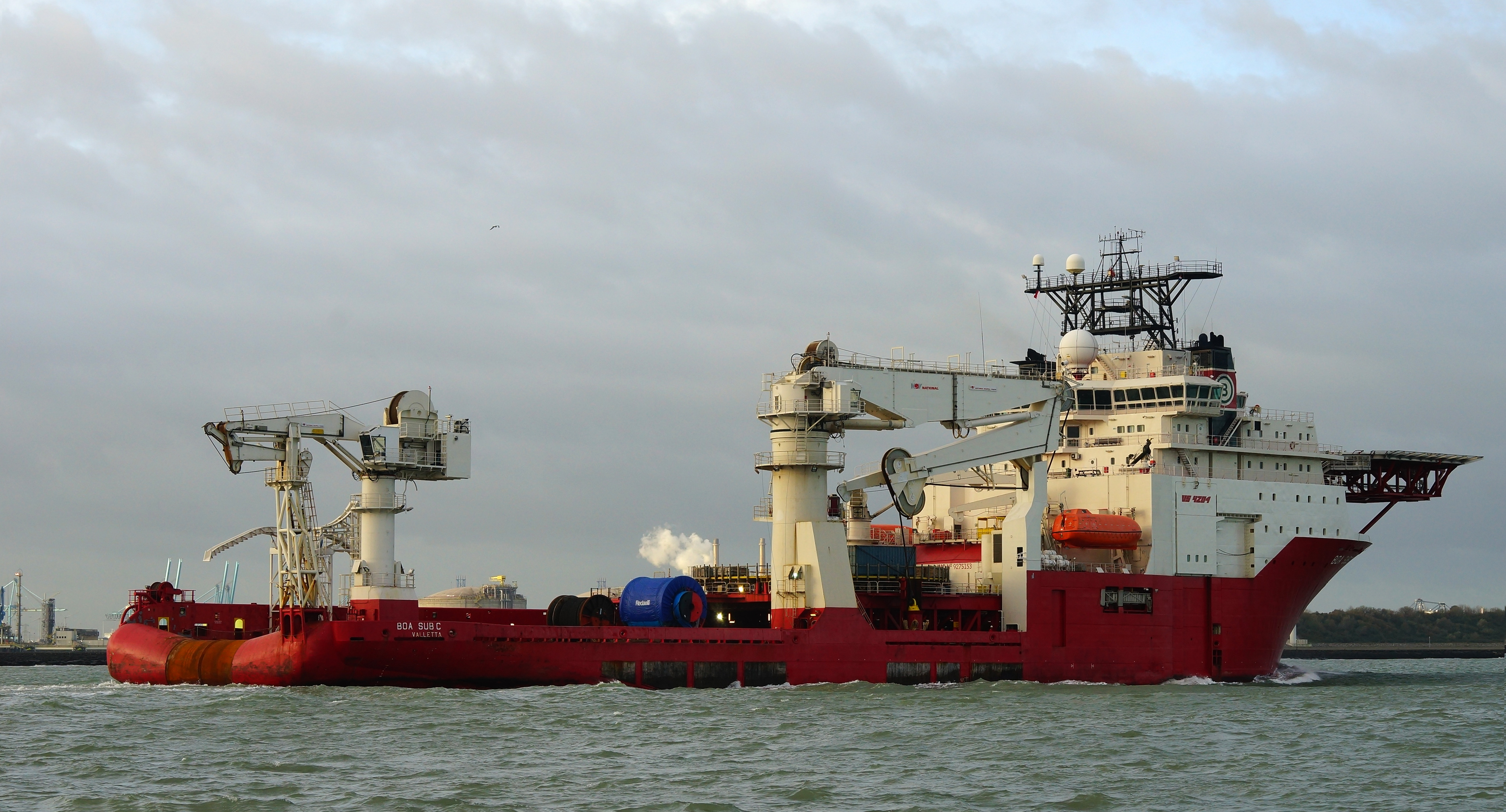 Maasmond 18-11-2015